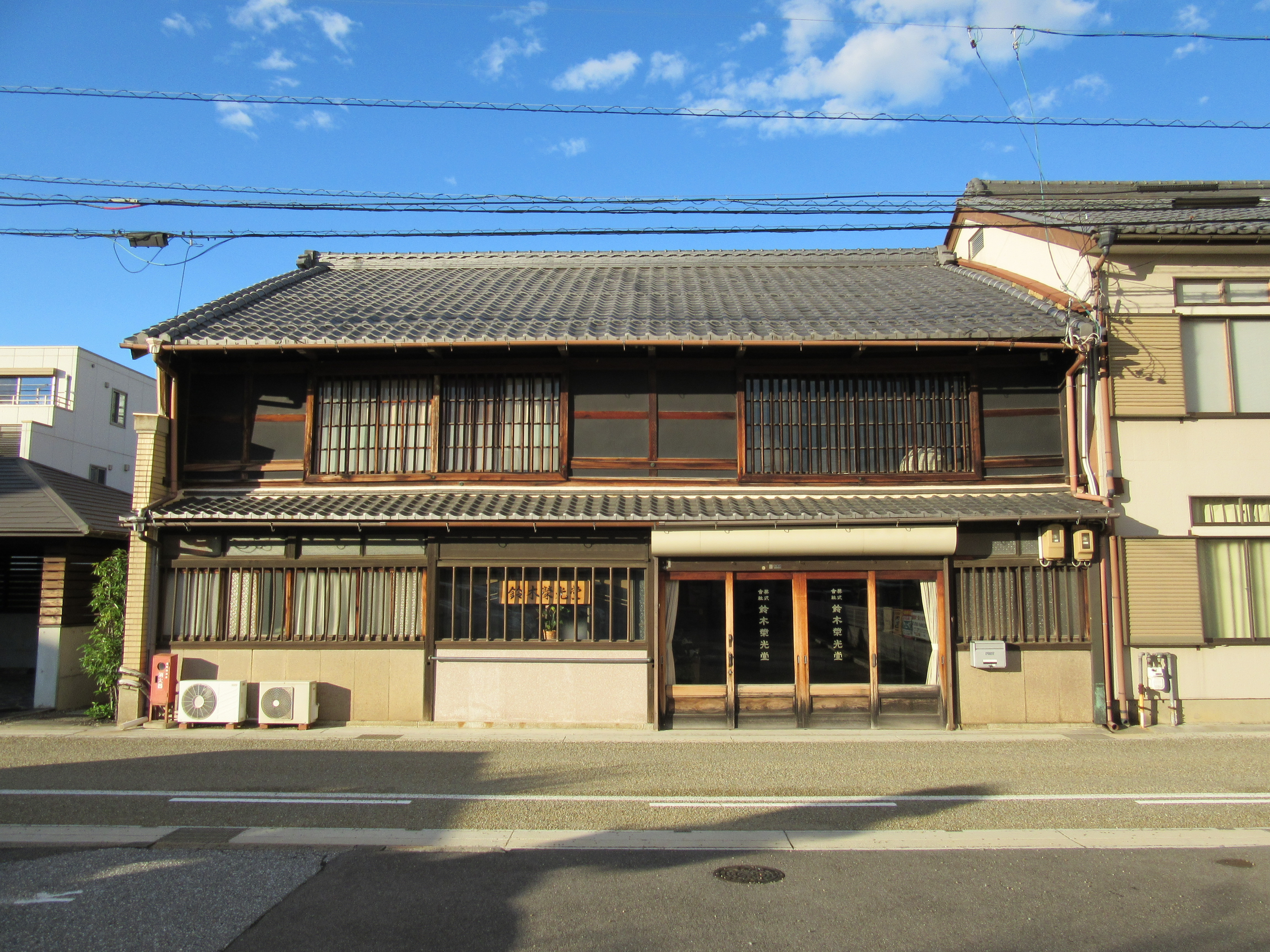 鈴木栄光堂